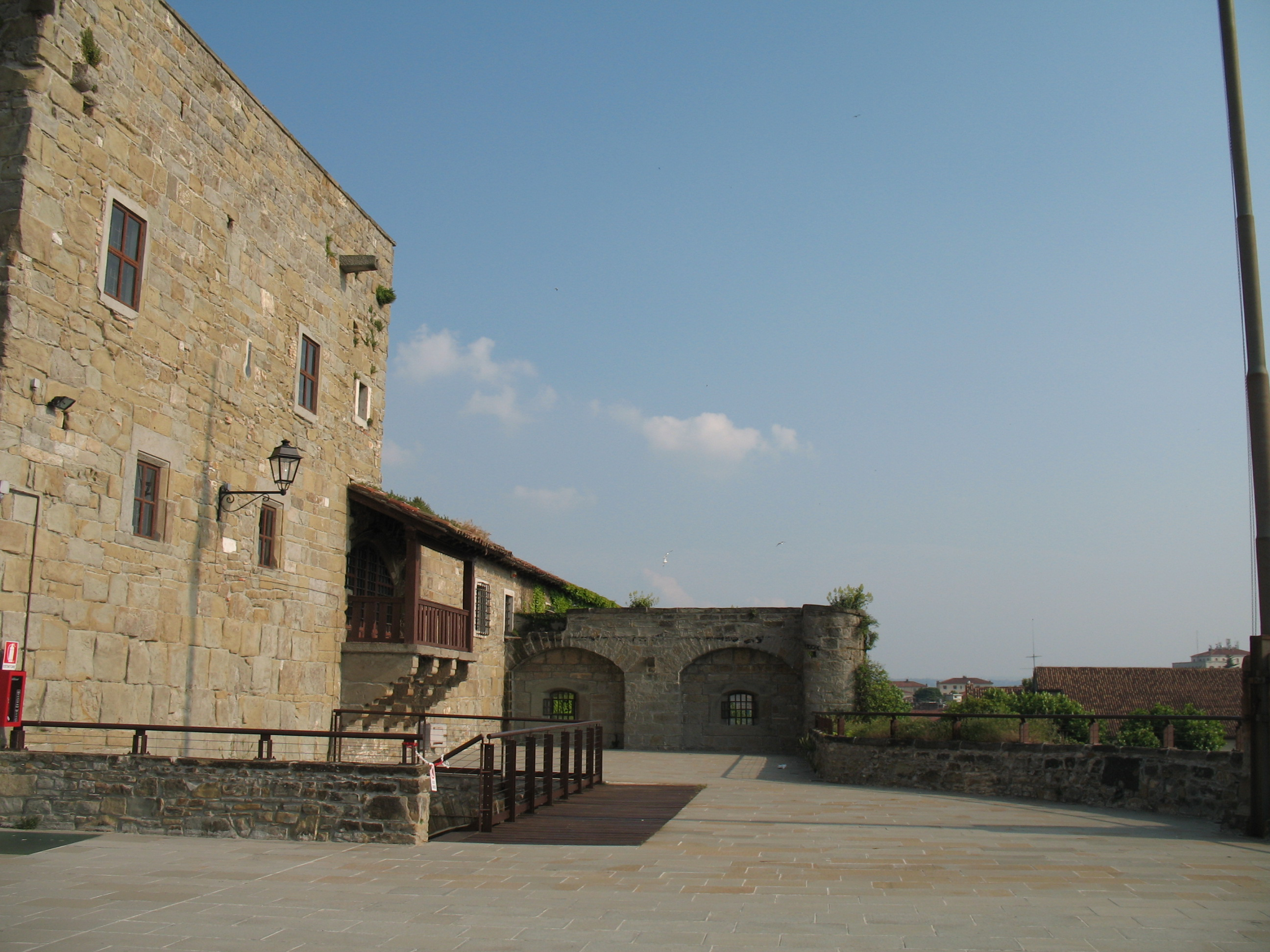 Immagine da Trieste - Castello di San Giusto.